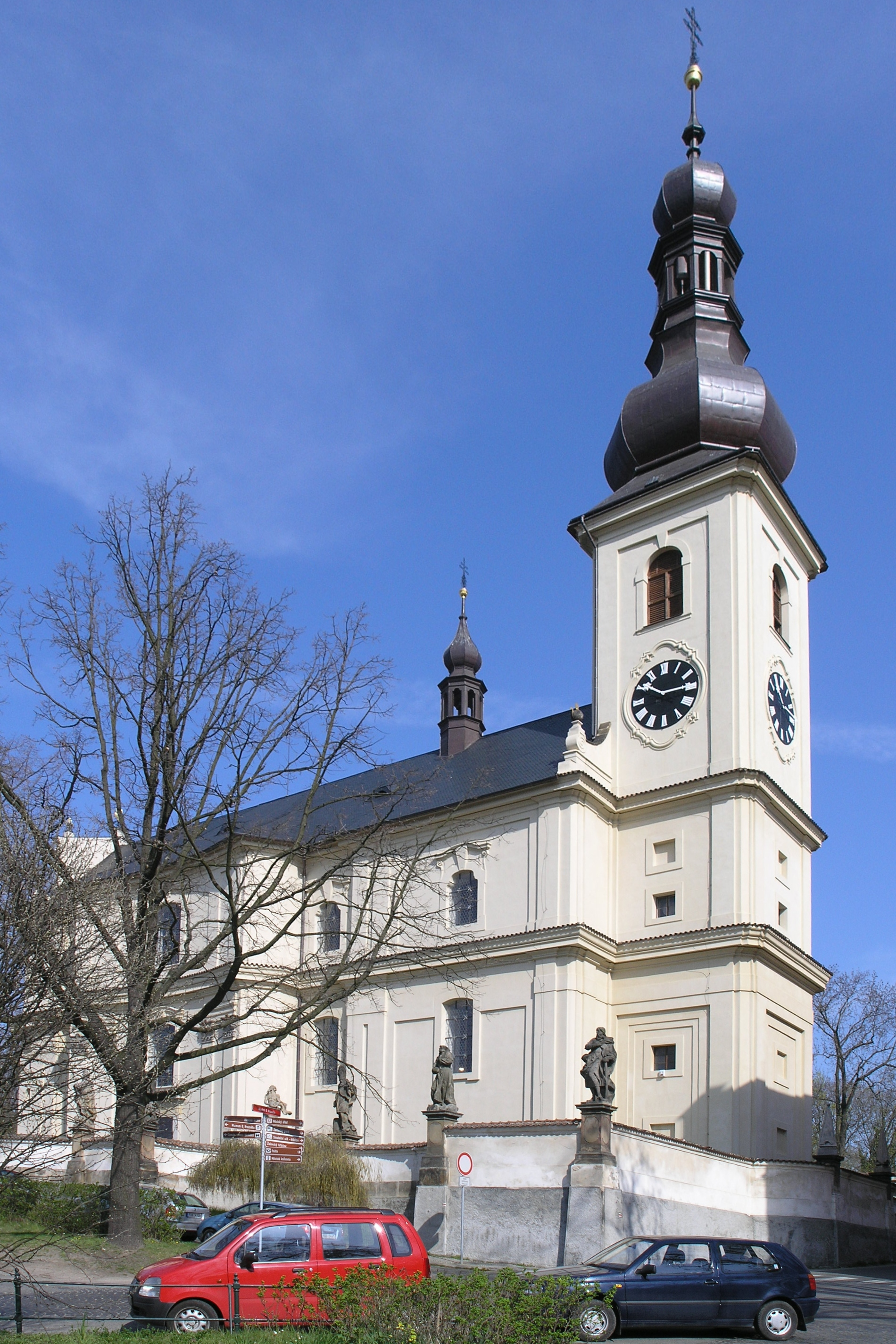 Lysa nad Labem - kostel sv Jana Krtitele